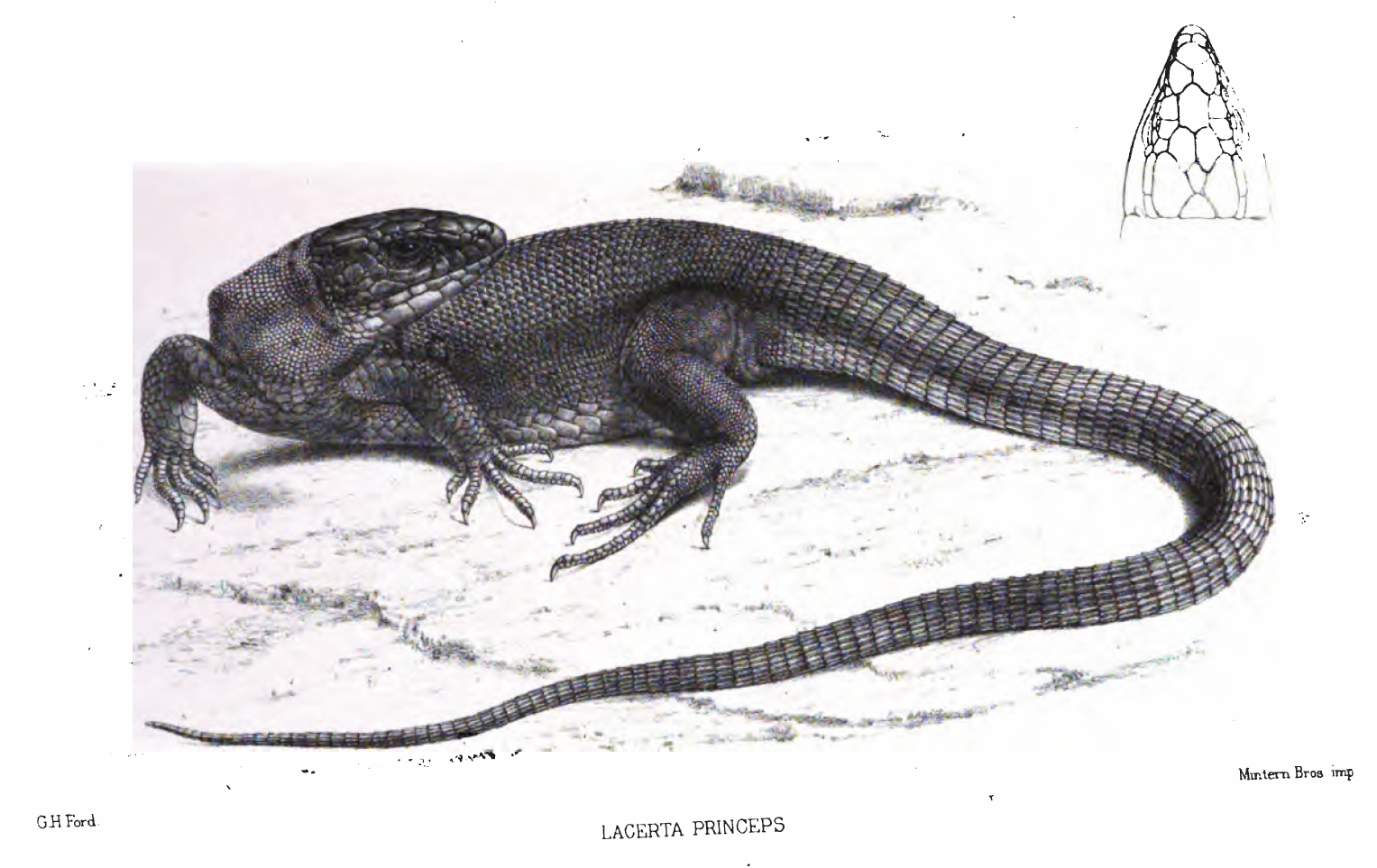 "Lacerta" princeps (= Timon princeps)